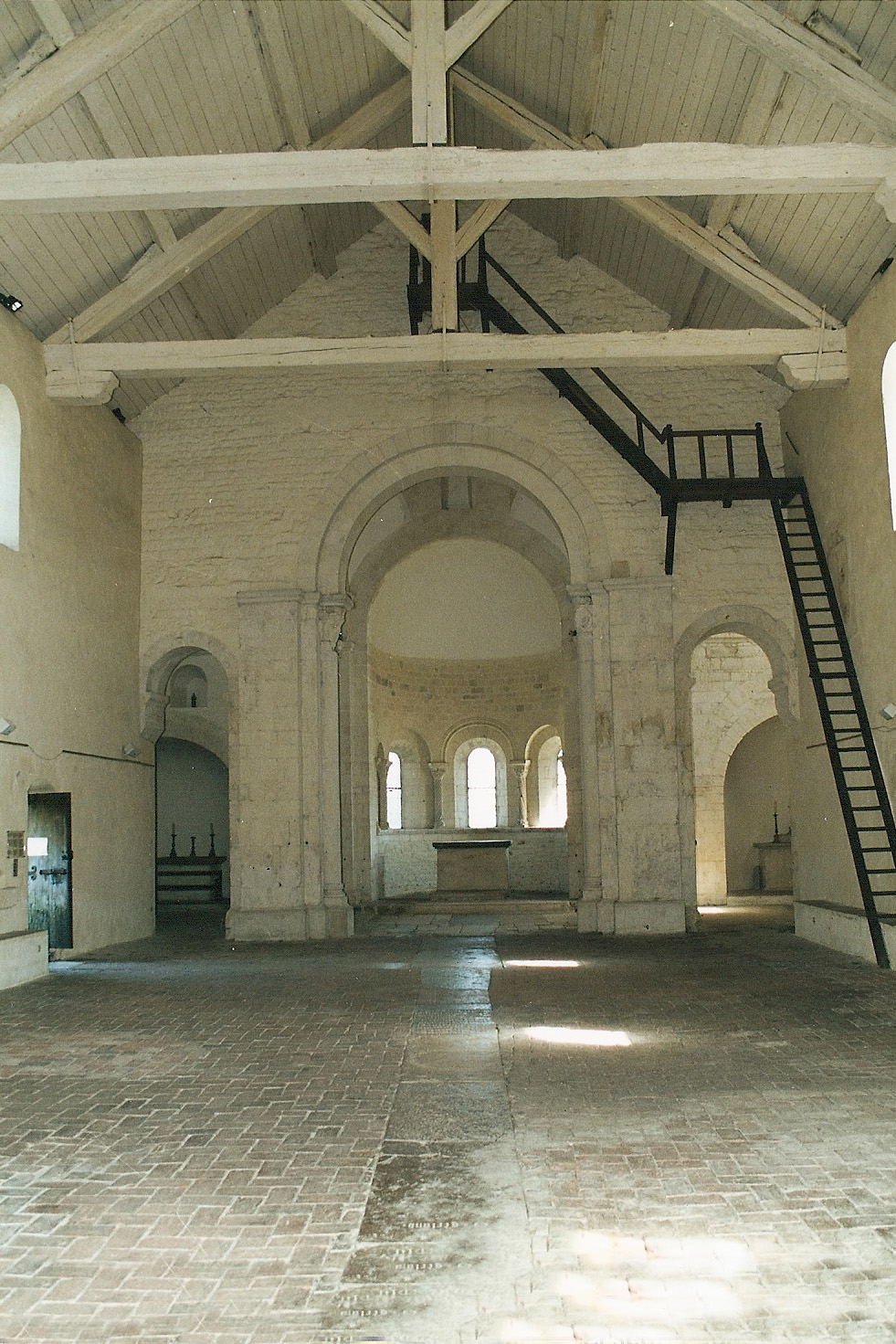 St.-André-de-Bâgé, Schiff zum Chor